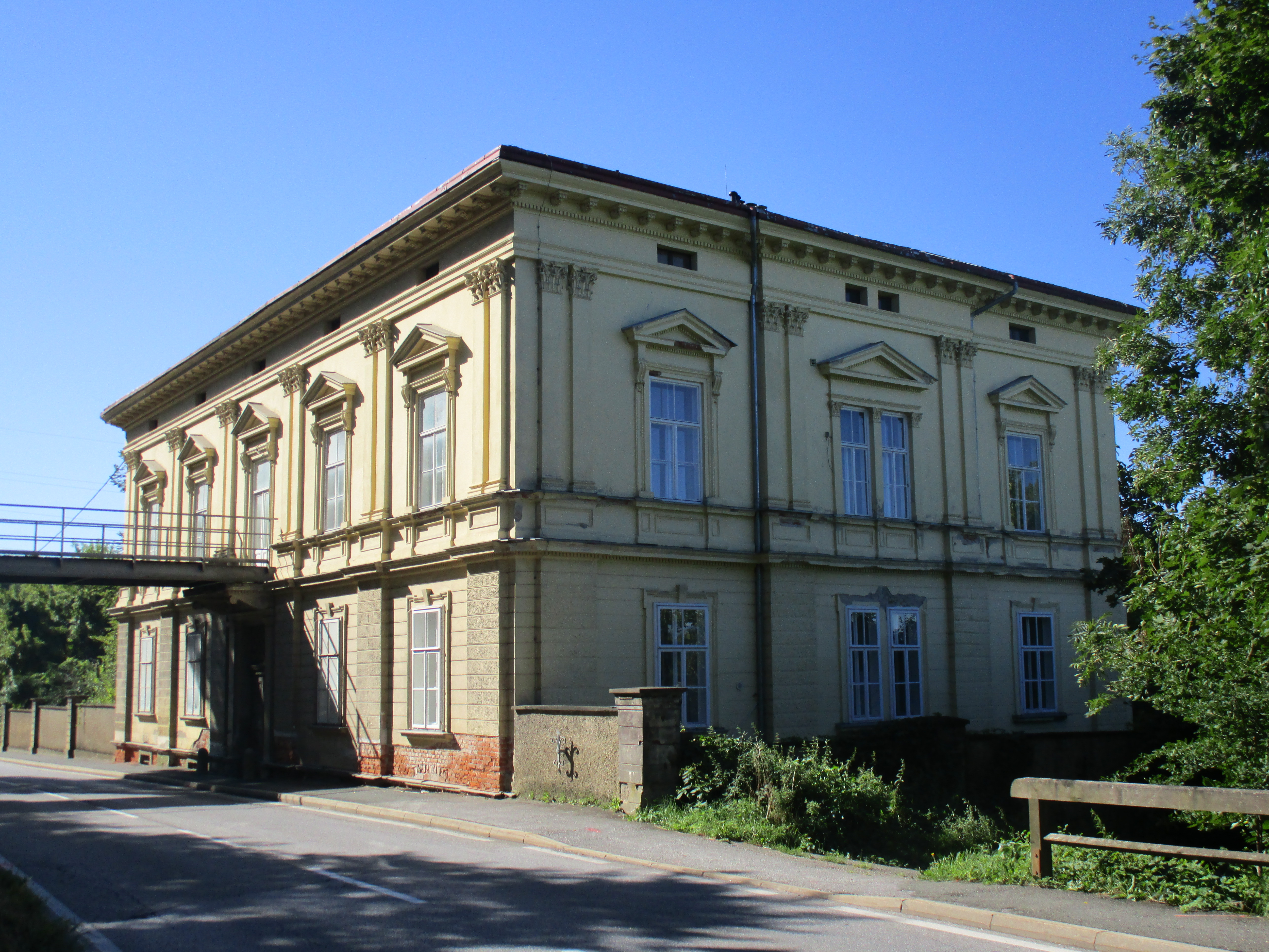 Schloss Spielerhof (Grambach) von Norden